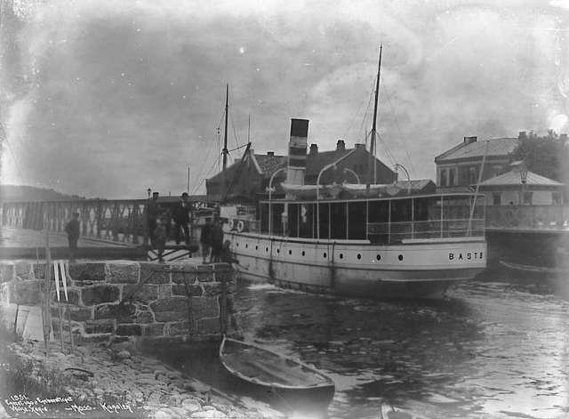 Moss - Kanalen Broen aapen 14. Juni 1902. Bildet viser lokalbåt BASTØ II som pr.1902 tilhørte Moss-Horten Dampskibsselskab, Moss og gikk i rute Moss-Oslo.